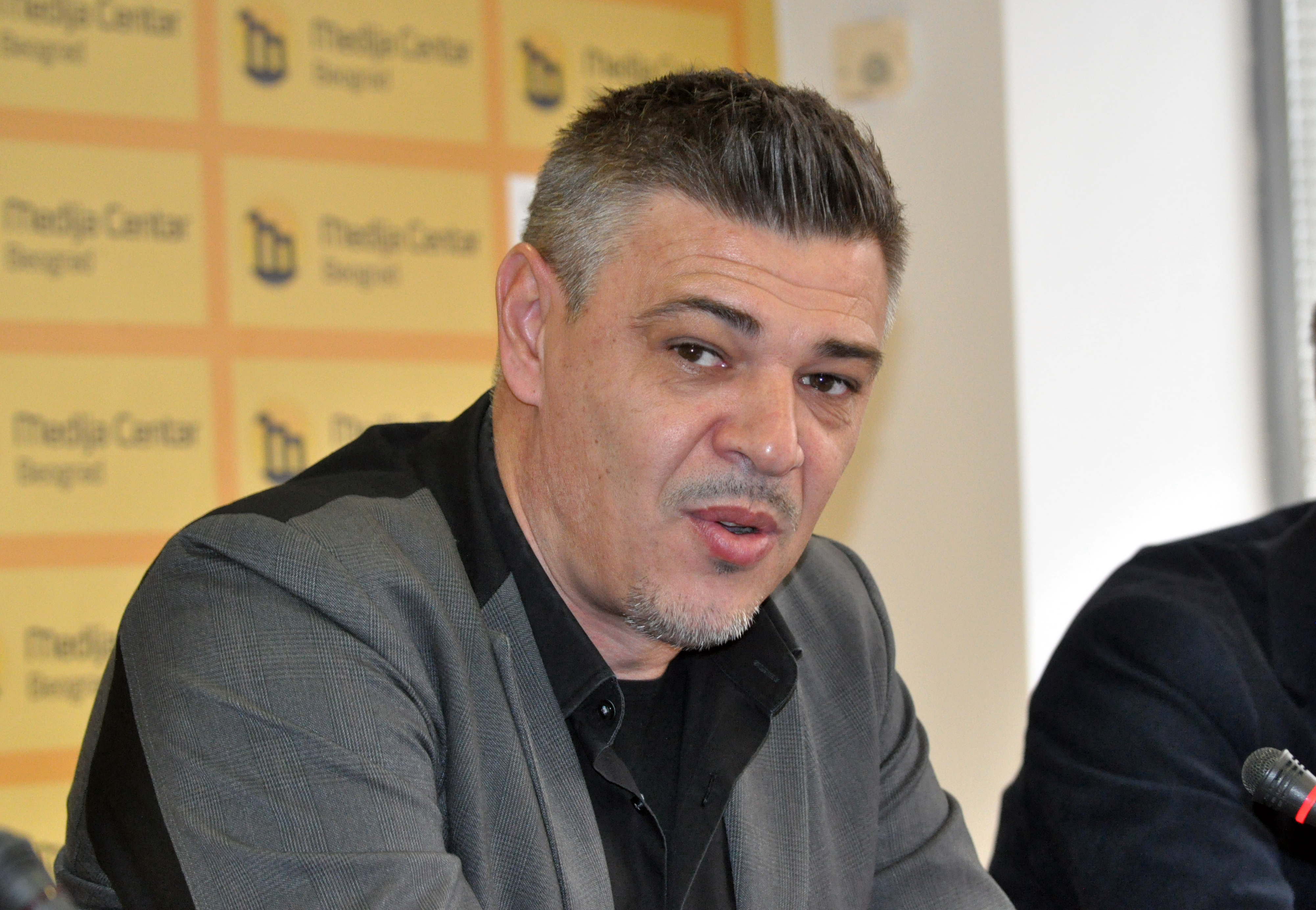 Savo Milošević srpski sportista